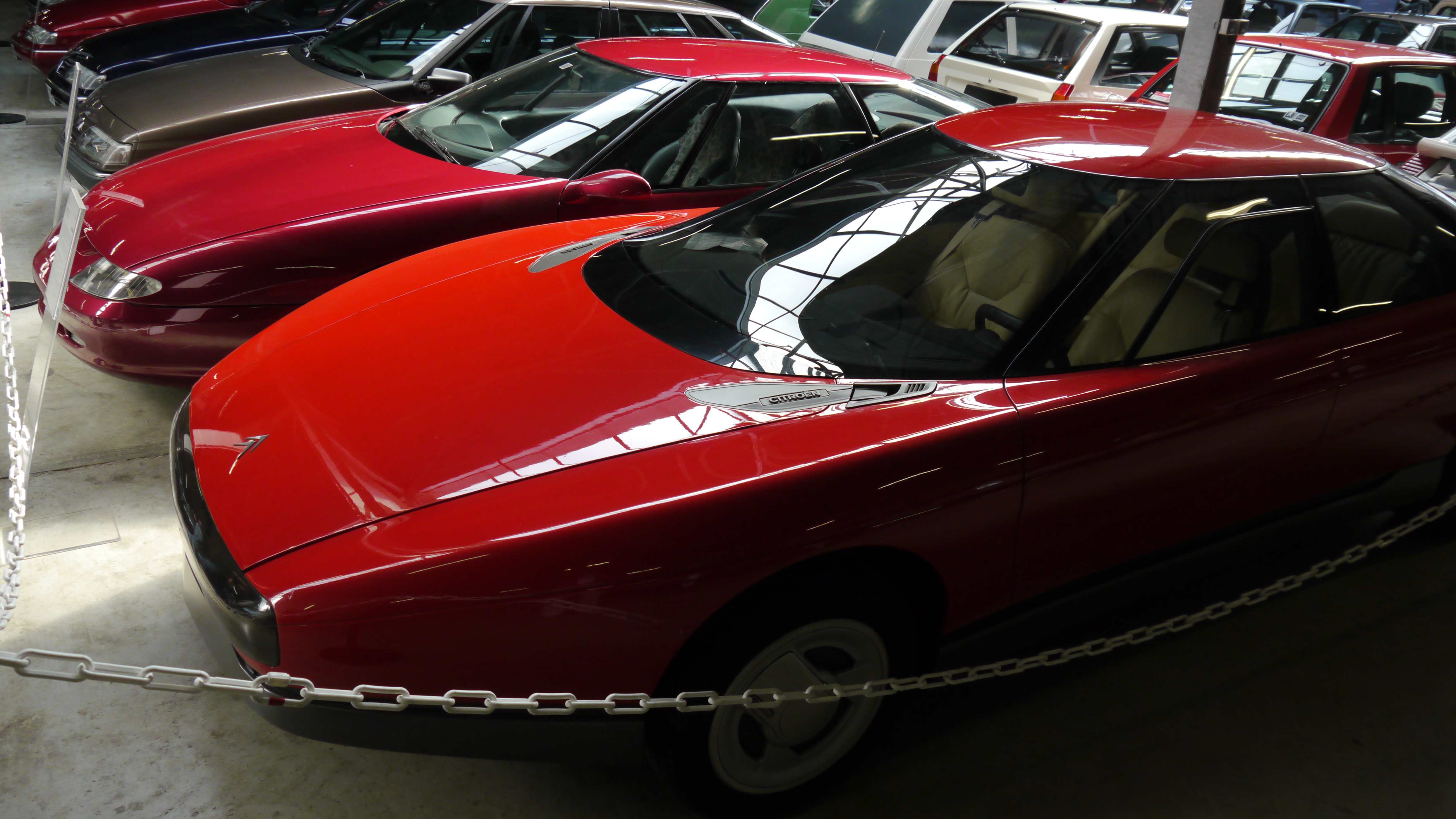 Conservatoire Citroen 258